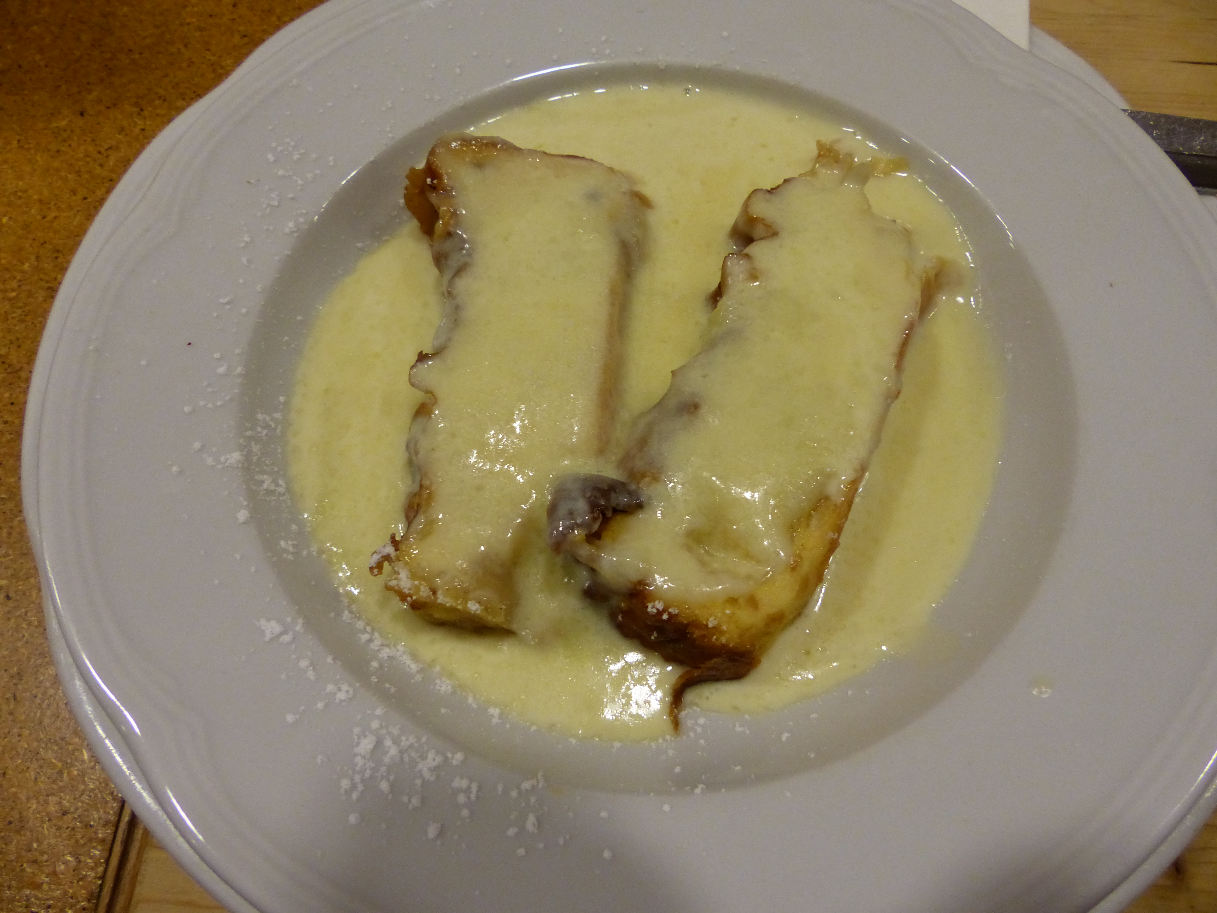 Wiener Milchrahmstrudel, Café Restaurant Schönbrunn, Wien